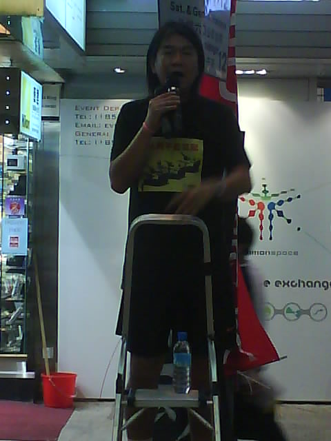 中文（香港）: 梁國雄。